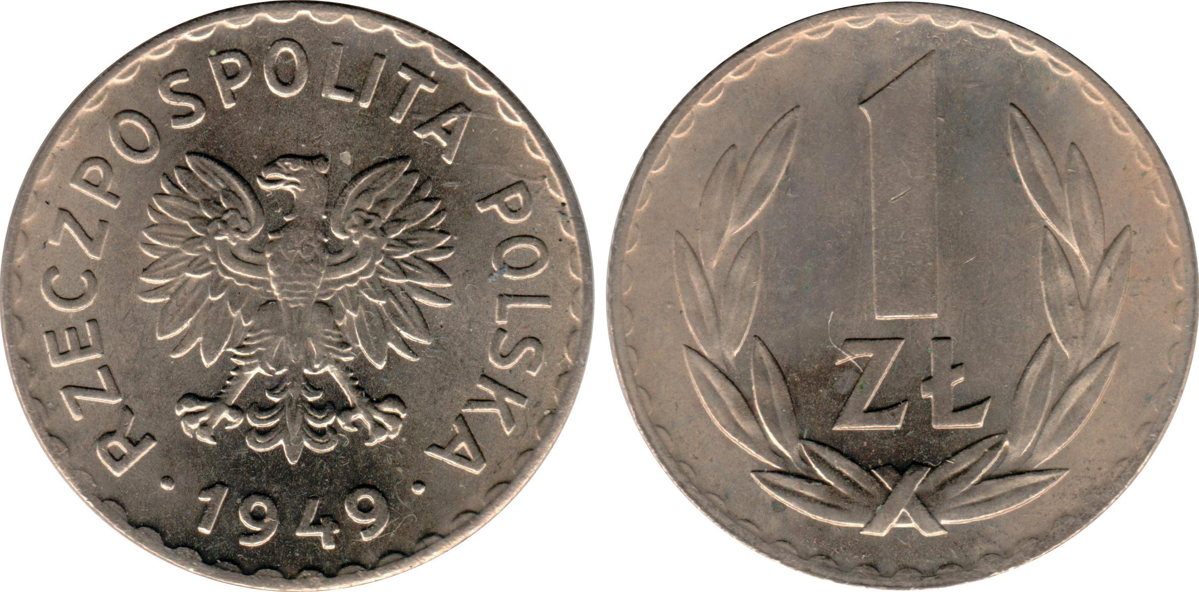 1 zloty 1949 CuNi